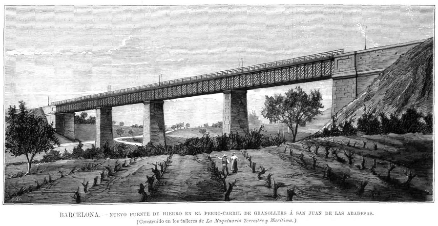 Nuevo puente de hierro en el ferro-carril de Granollers a San Juan de las Abadesas, construido en los talleres de La Maquinaria Terrestre y Marítima, en la revista española La Ilustración Española y Americana.